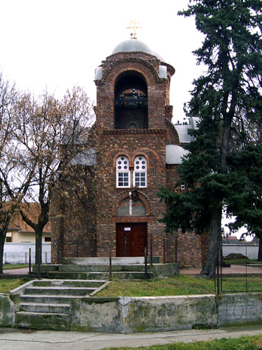 Crkva u Nakovu